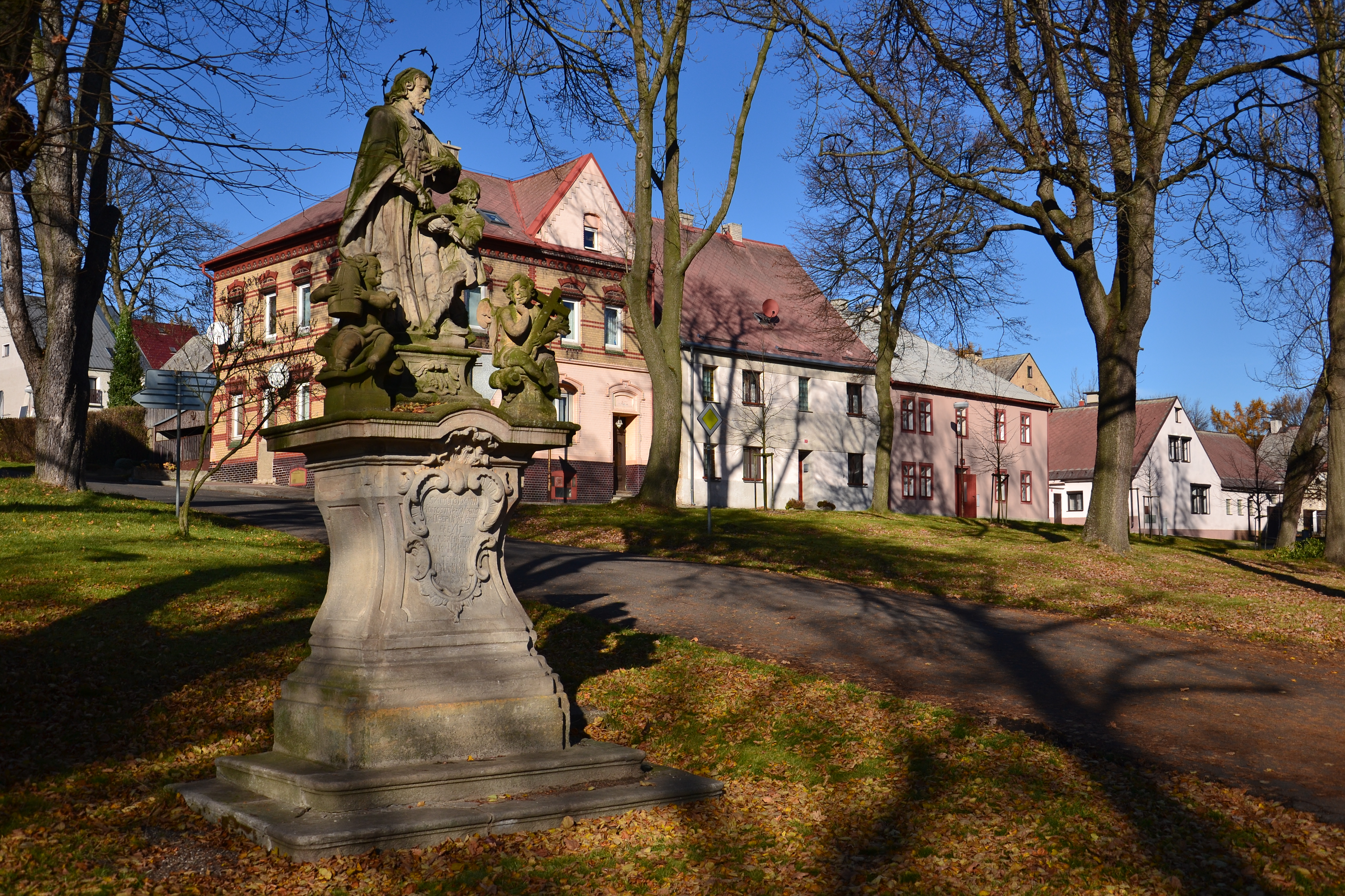 Sousoší svatého Jana Nepomuckého, střed obce, po pravé straně silnice do Vejprt, Výsluní, Výsluní.